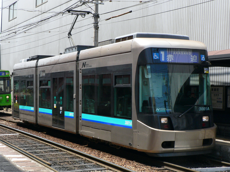 長崎電気軌道3000形電車。浦上車庫前電停にて撮影。